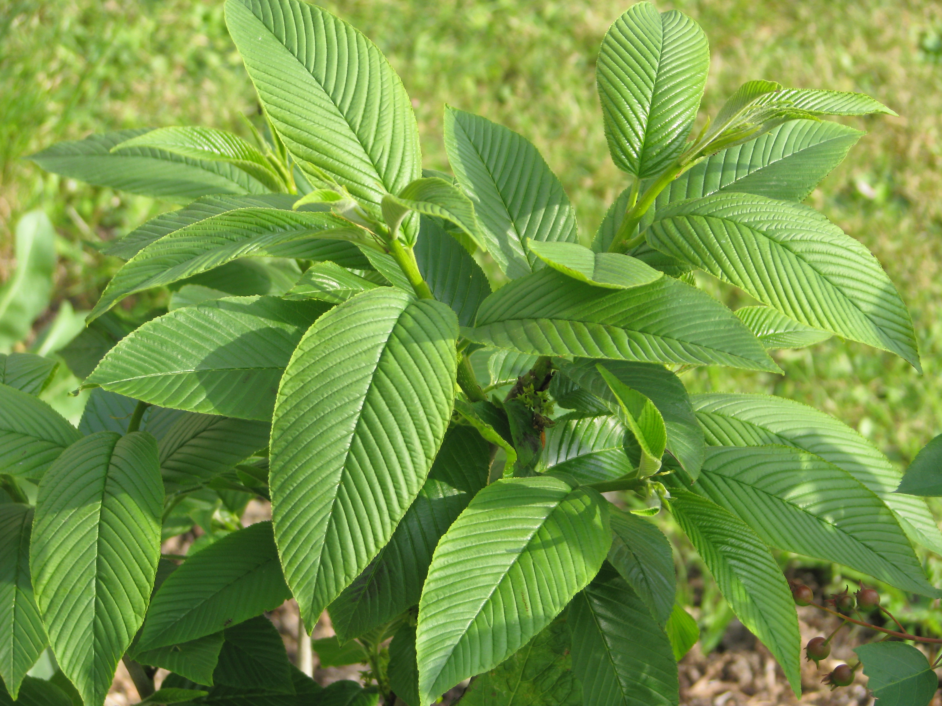 imeretinus